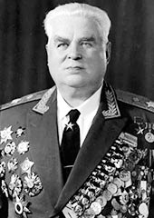 Иванов Семён Павлович (1907 — 1993) — советский военачальник, генерал армии